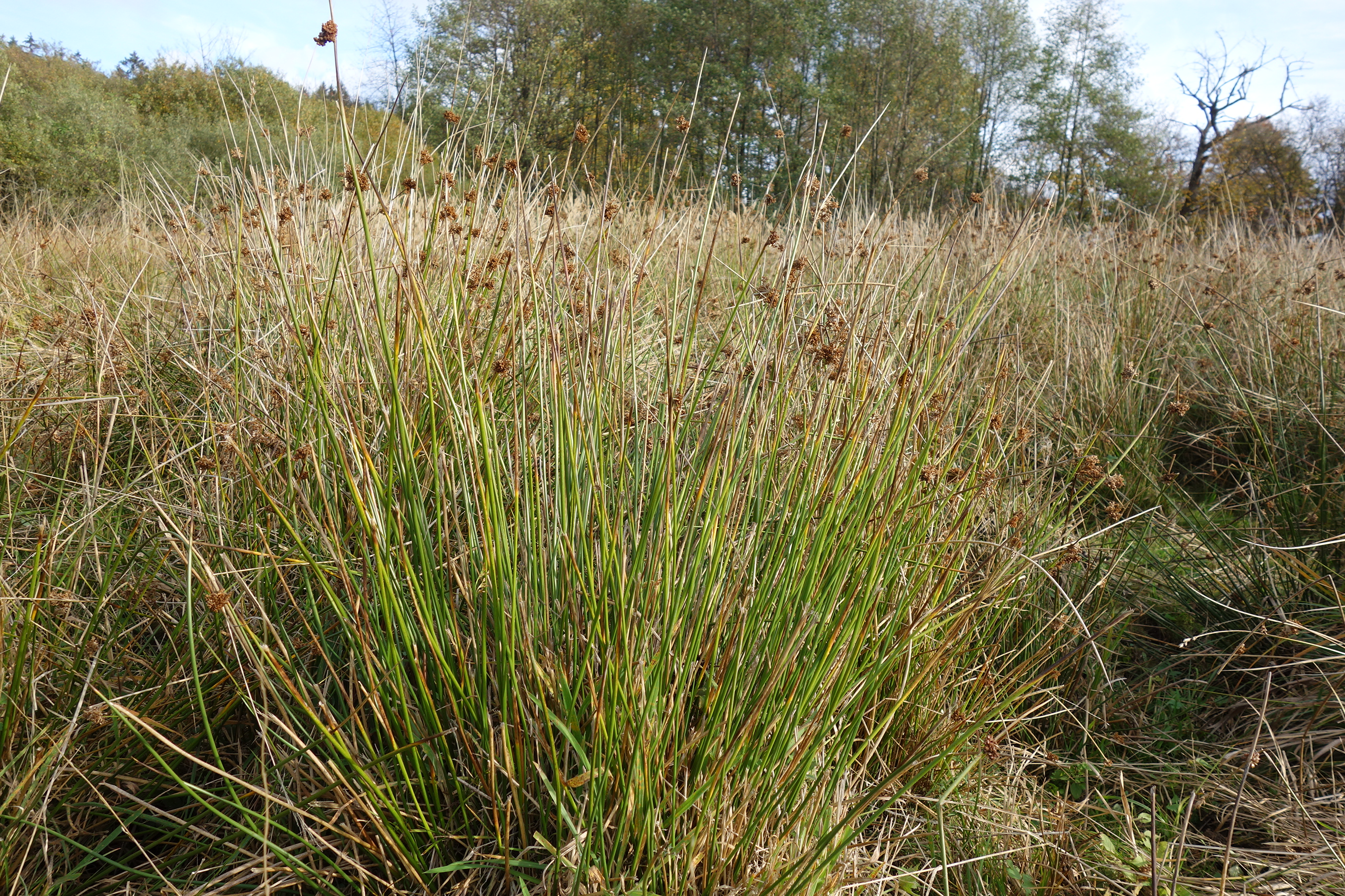 Kvetoucí sítina